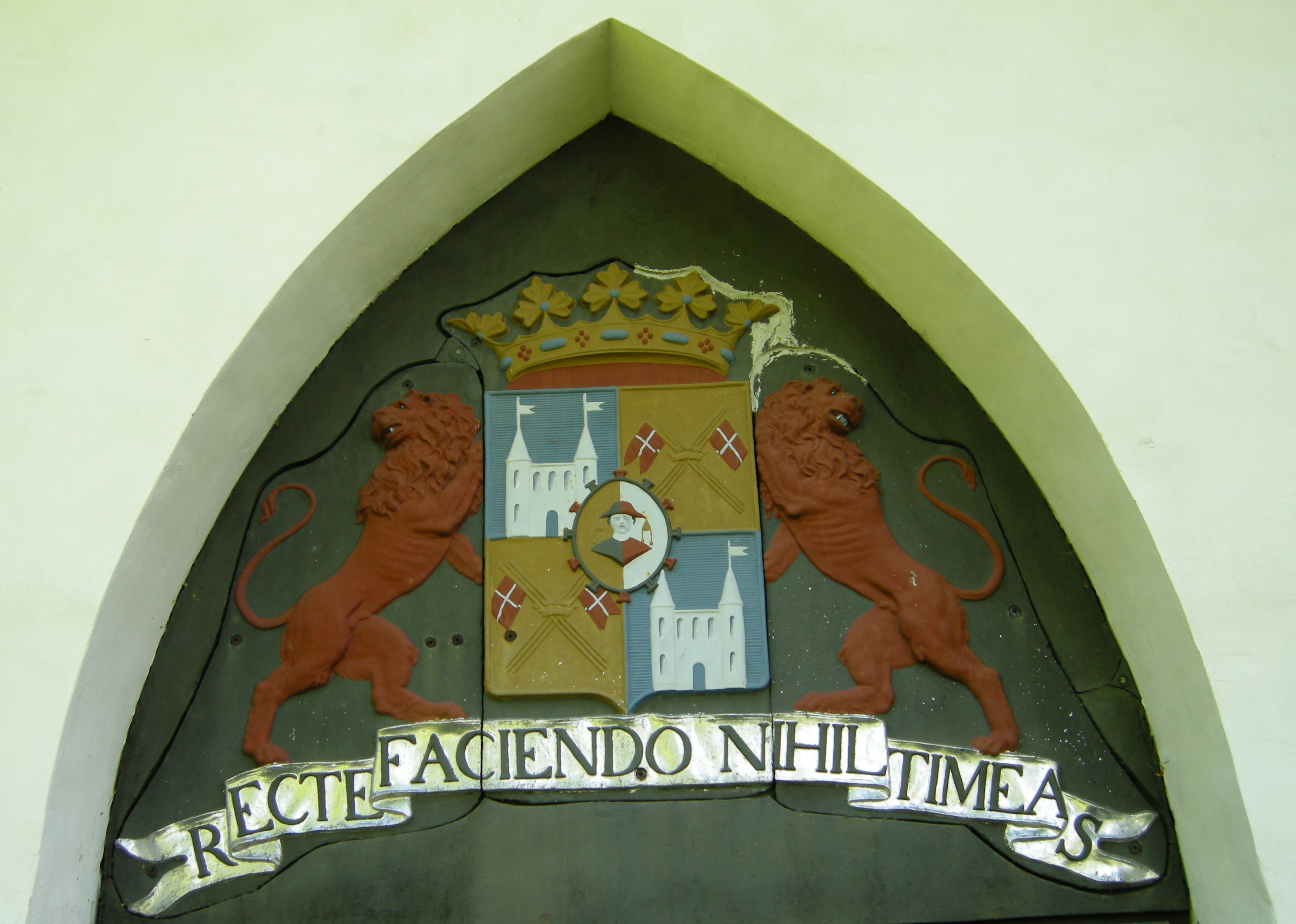 Våpenskjold Wedel-Jarlsberg, Sem kirke